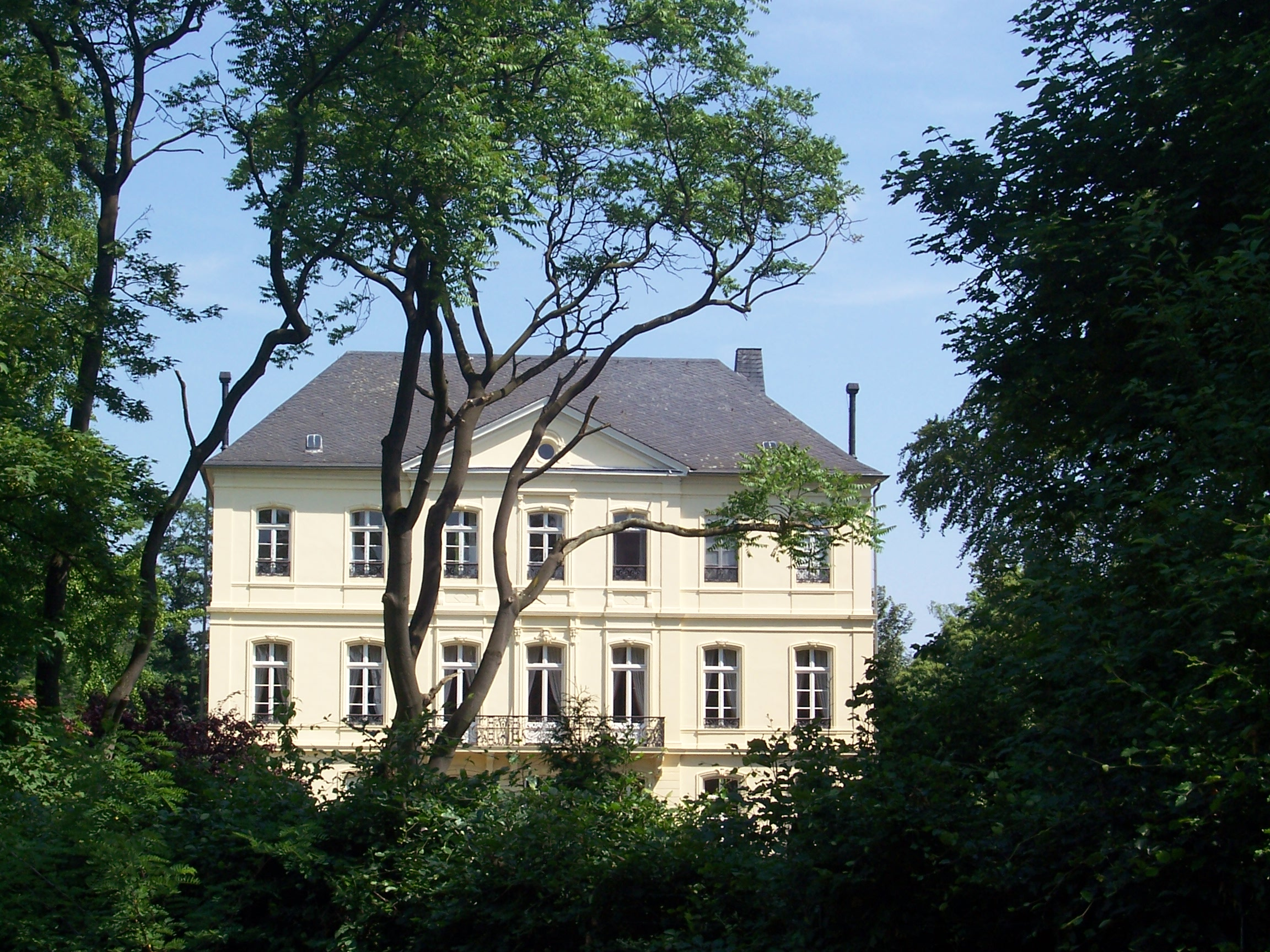 Schloss Leyenburg, a castle in Rheurdt, Germany